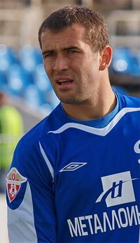 Aleksandr Kerzhakov, Russian footballer.